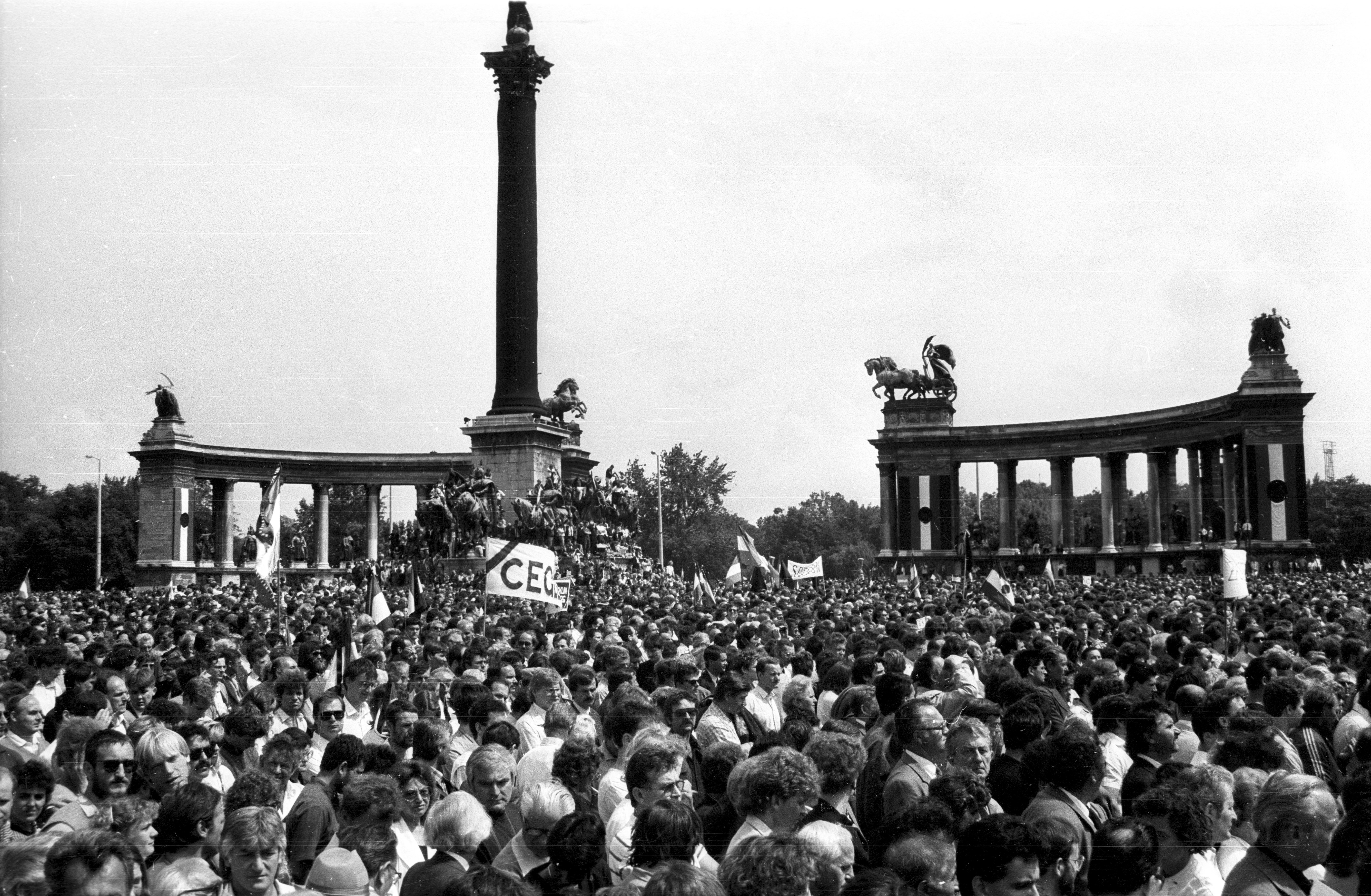 Hősök tere 1989. június 16-án, az 56-os hősök újratemetésekor.